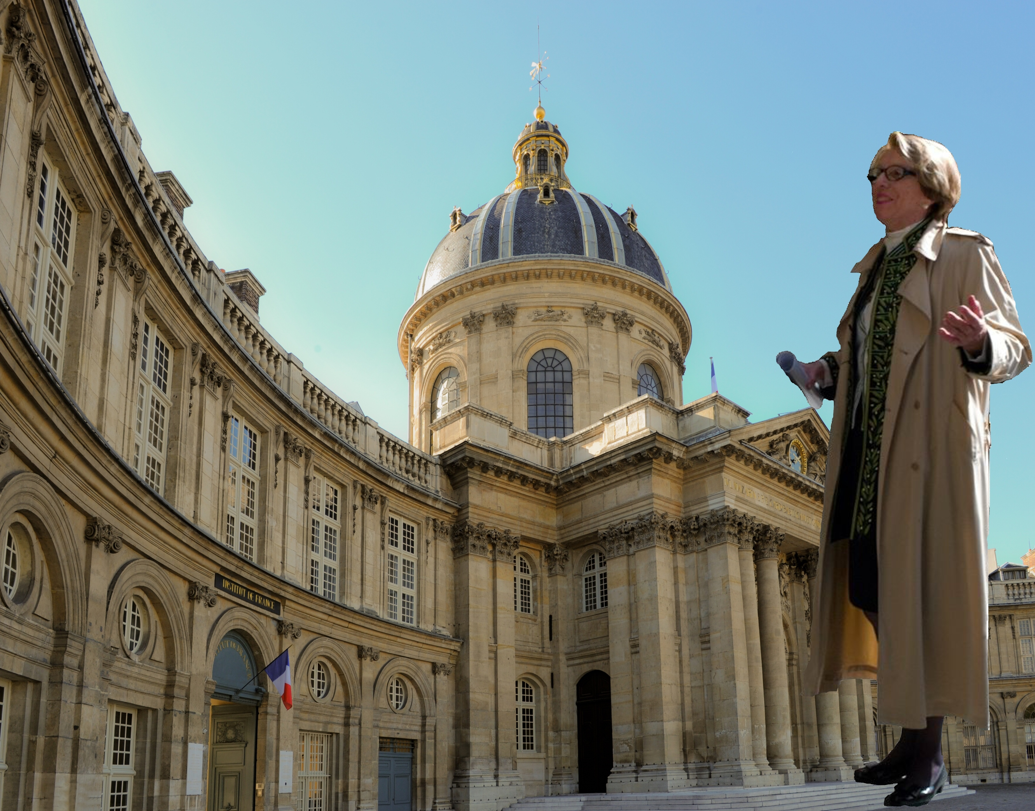 Réception de Danièle Sallenave à l'Académie française